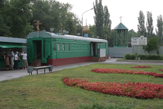 Липецк, площадь Франценюка